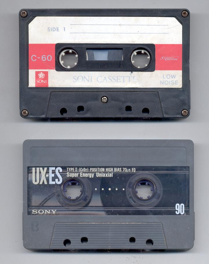 Audio cintas: una marca SONI (falsificación, arriba) y la otra SONY(original, abajo).